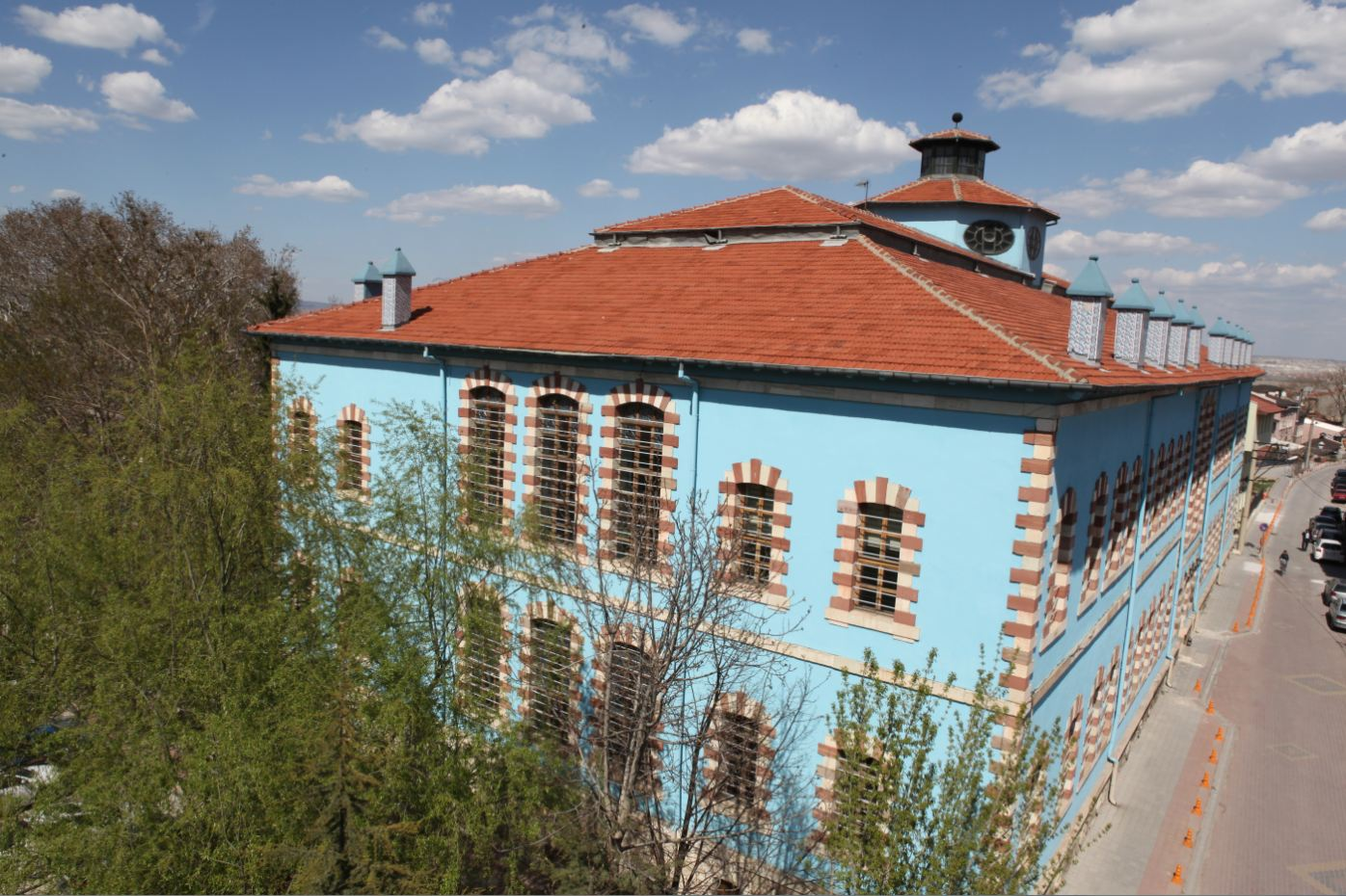 Eski Hükümet Konağı, Kütahya.